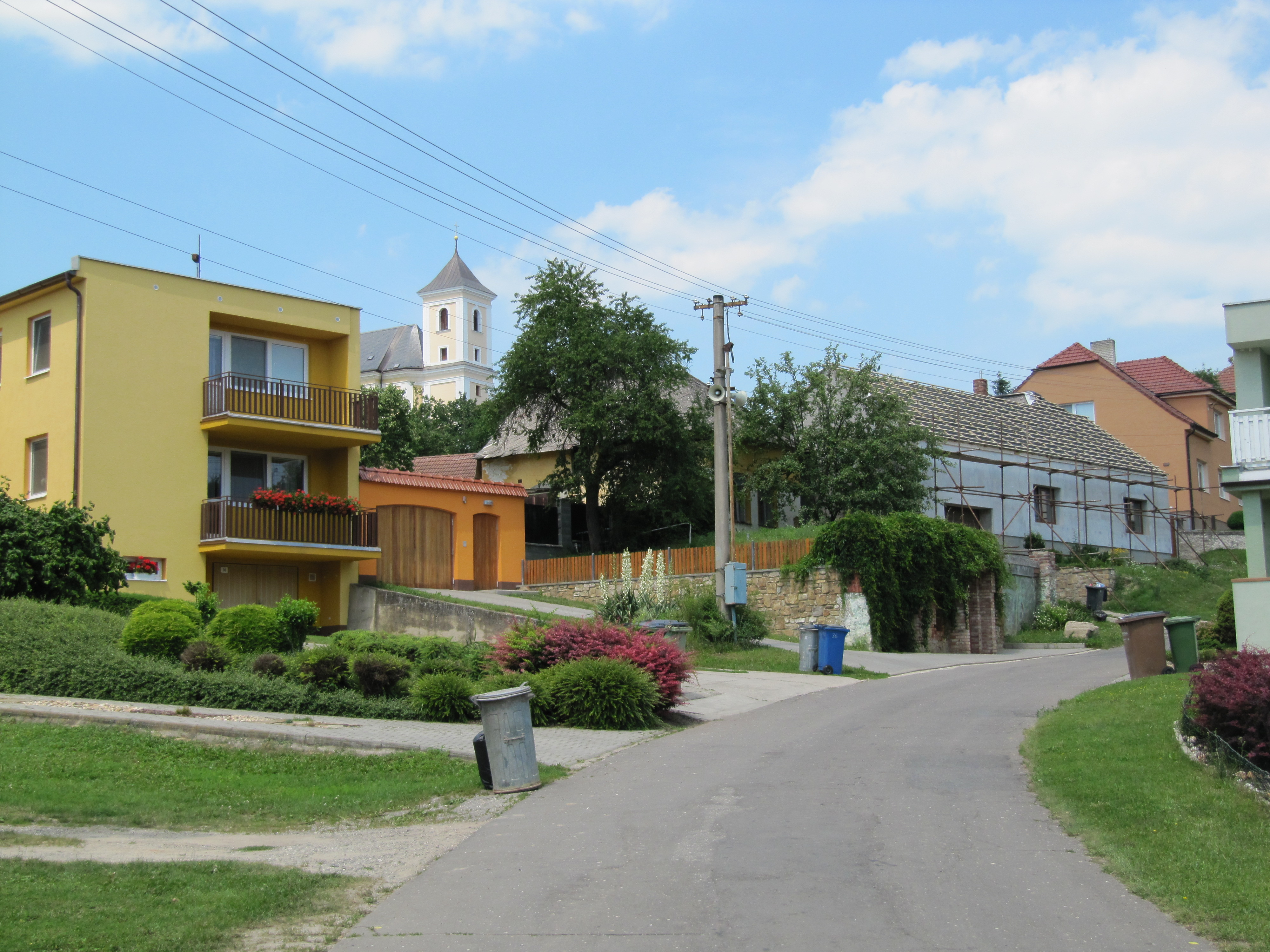 Syrovín